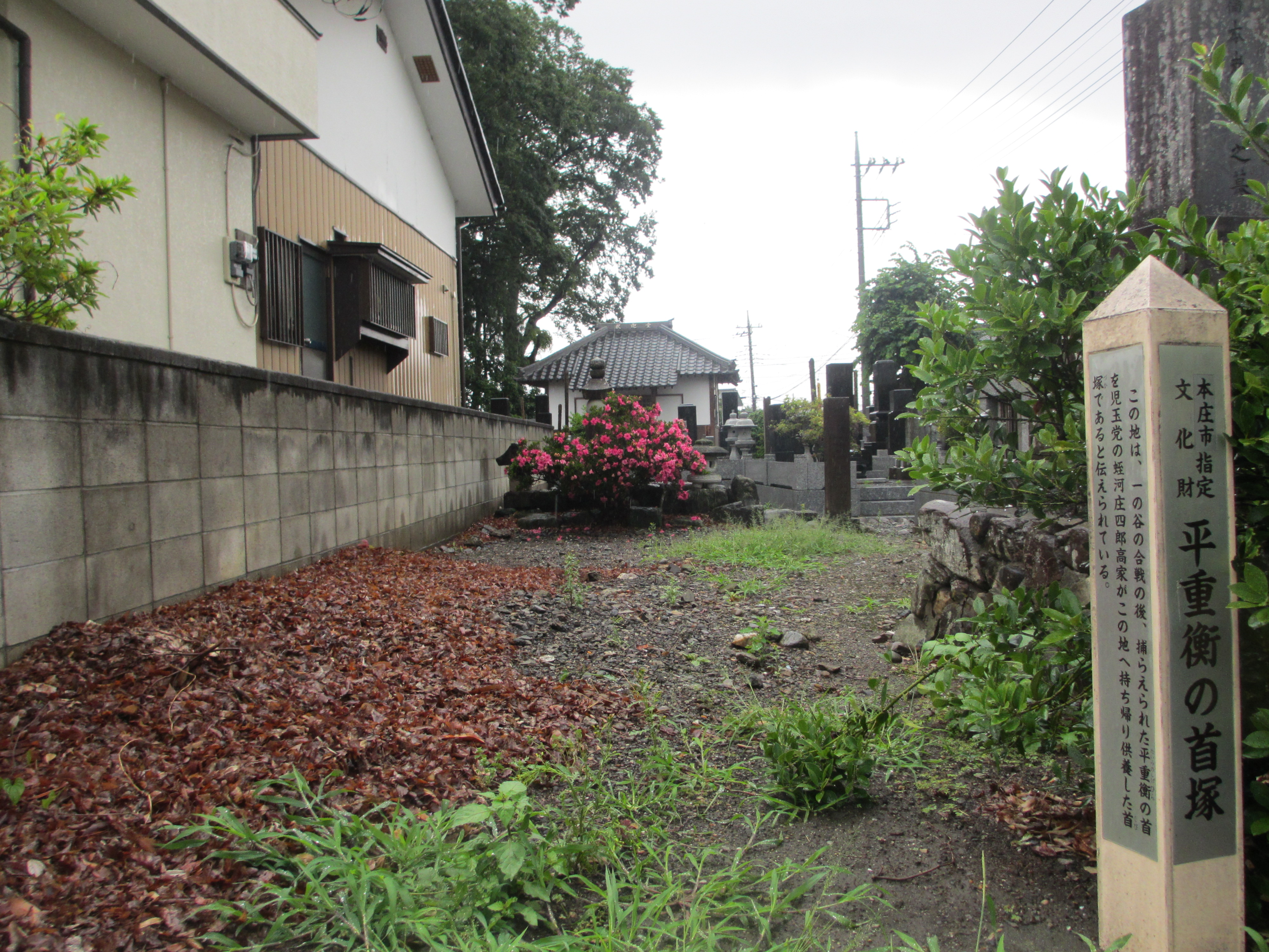 最寄りは八高線児玉駅だが本数少ない